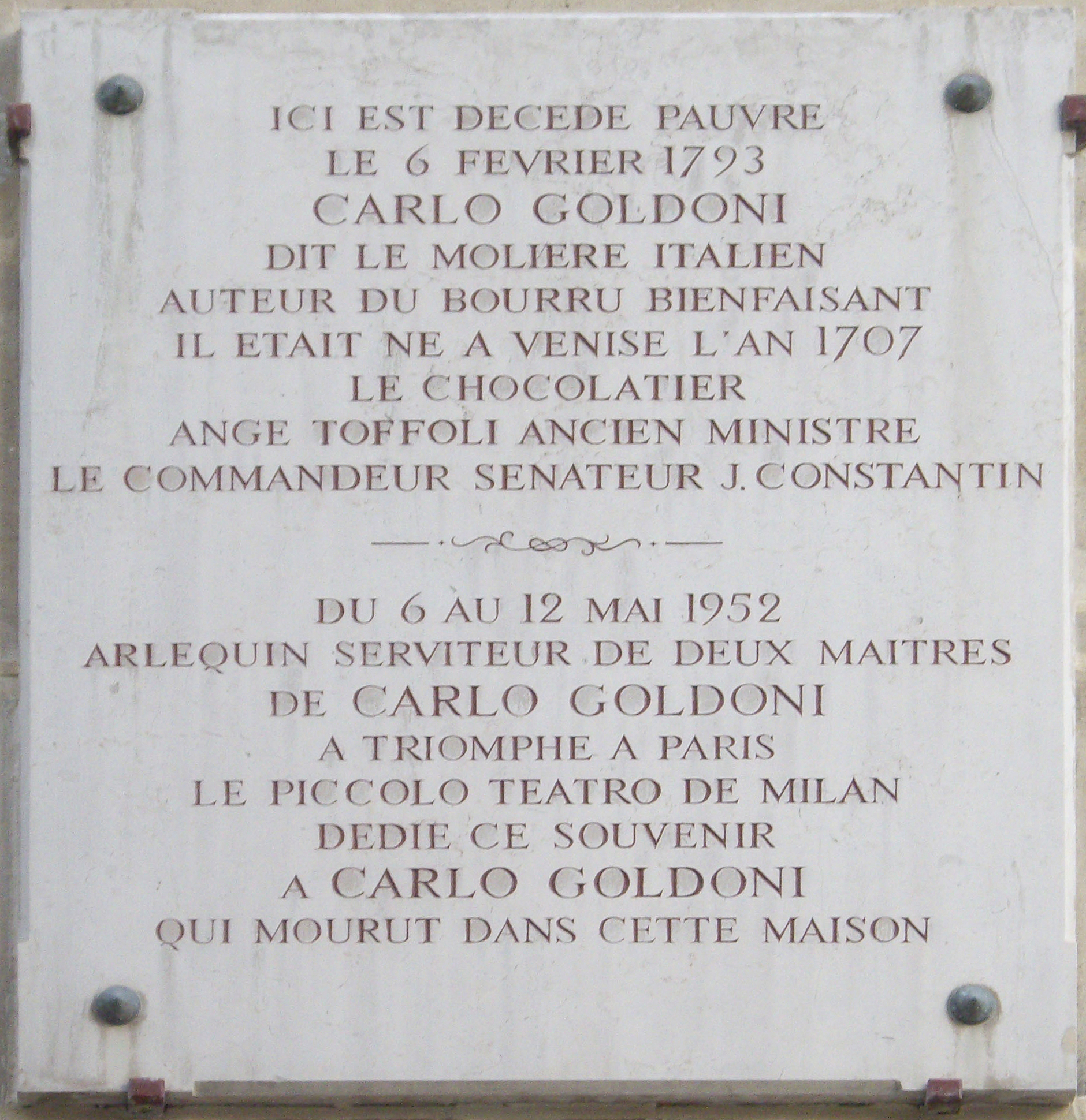 Plaque commémorative, 21 rue Dussoubs, Paris 2e.« Ici est décédé, pauvre, le 6 février 1793, Carlo Coldoni, dit le Molière italien, auteur du Bourru bienfaisant. Il était né à Venise l'an 1707. Le chocloatier Ange Toffoli, ancien ministre. Le commandeur sénateur J. Constantin.Du 6 au 12 mai 1952, Arlequin serviteur de deux maîtres de Carlo Goldoni a triomphé à Paris. Le Piccolo Teatro de Milan dédie ce souvenir à Carlo Goldoni qui mourut dans cette maison. »